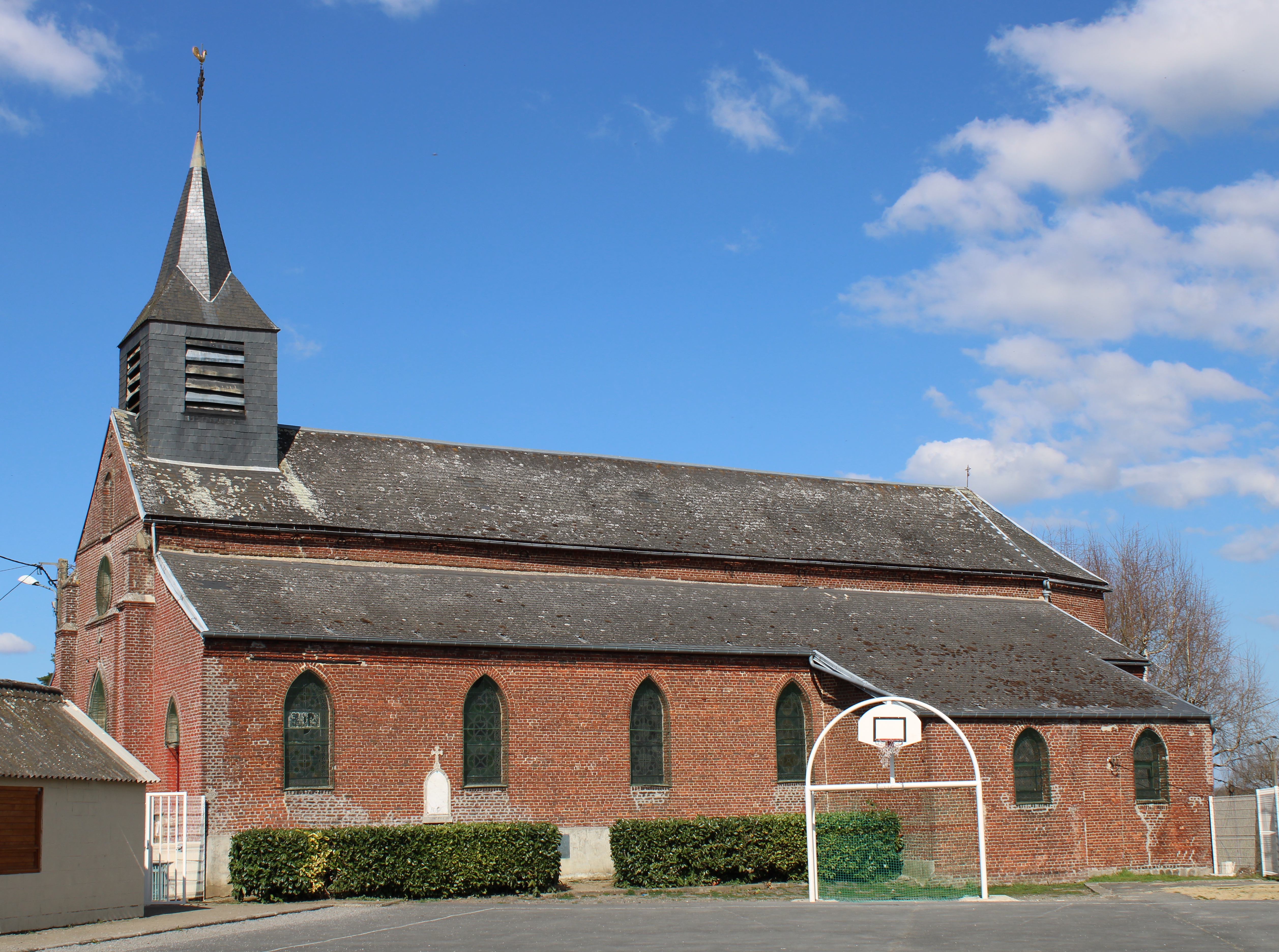 L'église.